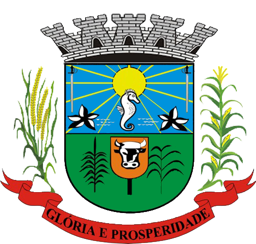 Brasão de Osório corrigido.